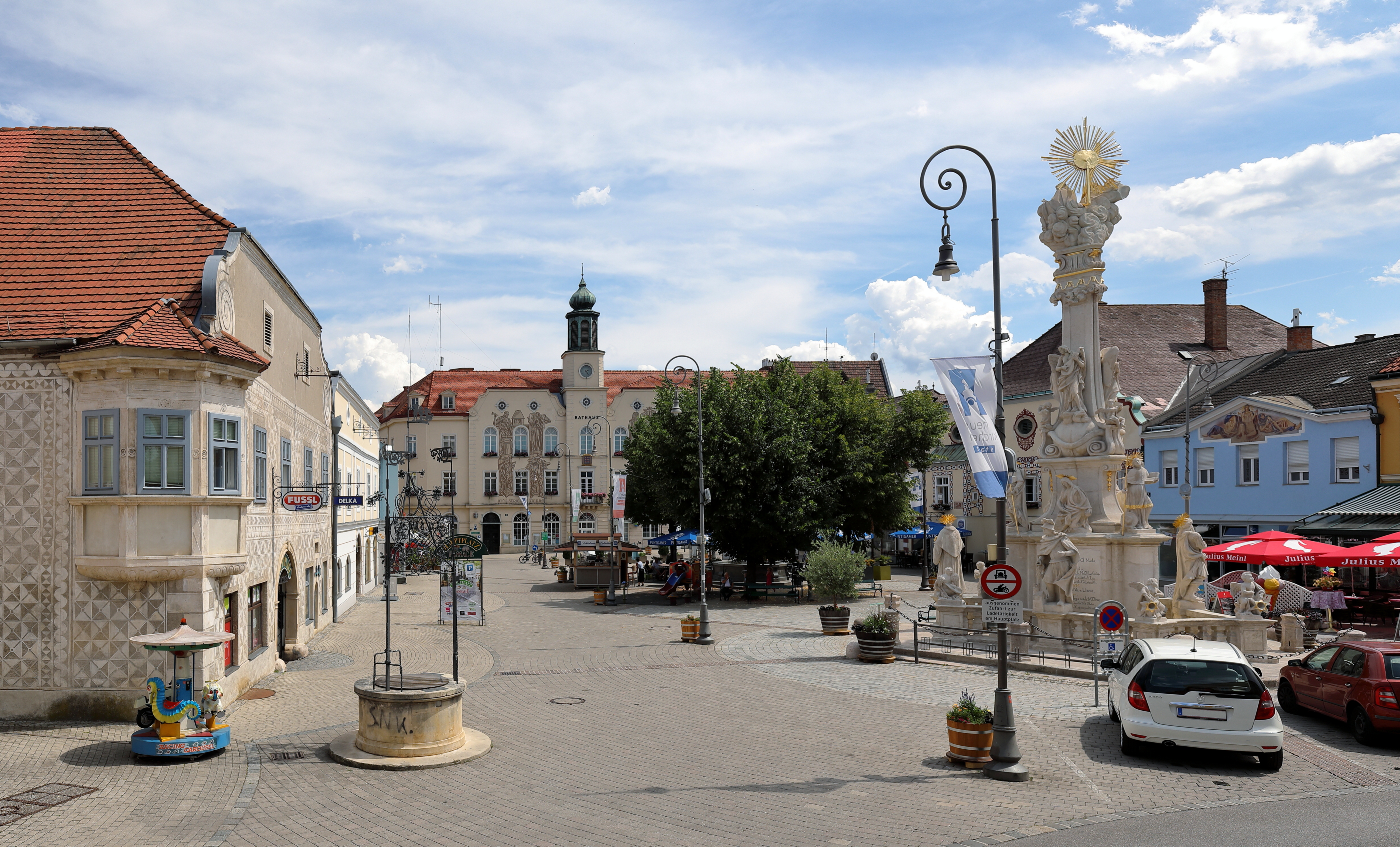 Nordwestansicht des Hauptplatzes der niederösterreichischen Stadtgemeinde Neunkirchen.Links das aus dem 16. Jahrhundert stammende sogenannte „Sgraffitohaus“. Im Hintergrund das von 1948 bis 1950 errichtete Rathaus und rechts die aus dem 18. Jahrhundert stammende Pest- bzw. Dreifaltigkeitssäule.